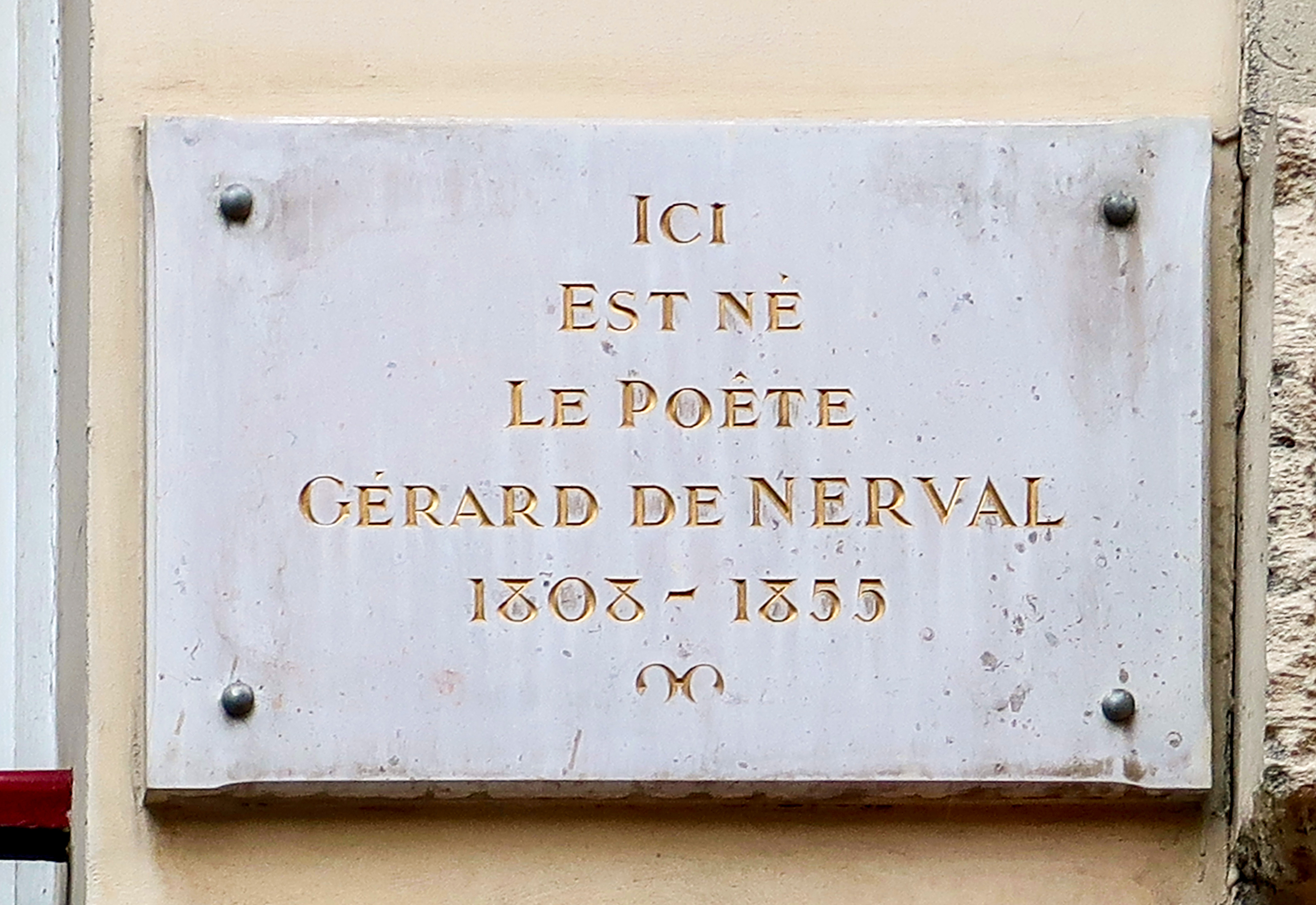 Plaque en hommage à Gérard de Nerval, 168-170 rue Saint-Martin (Paris, 3e).